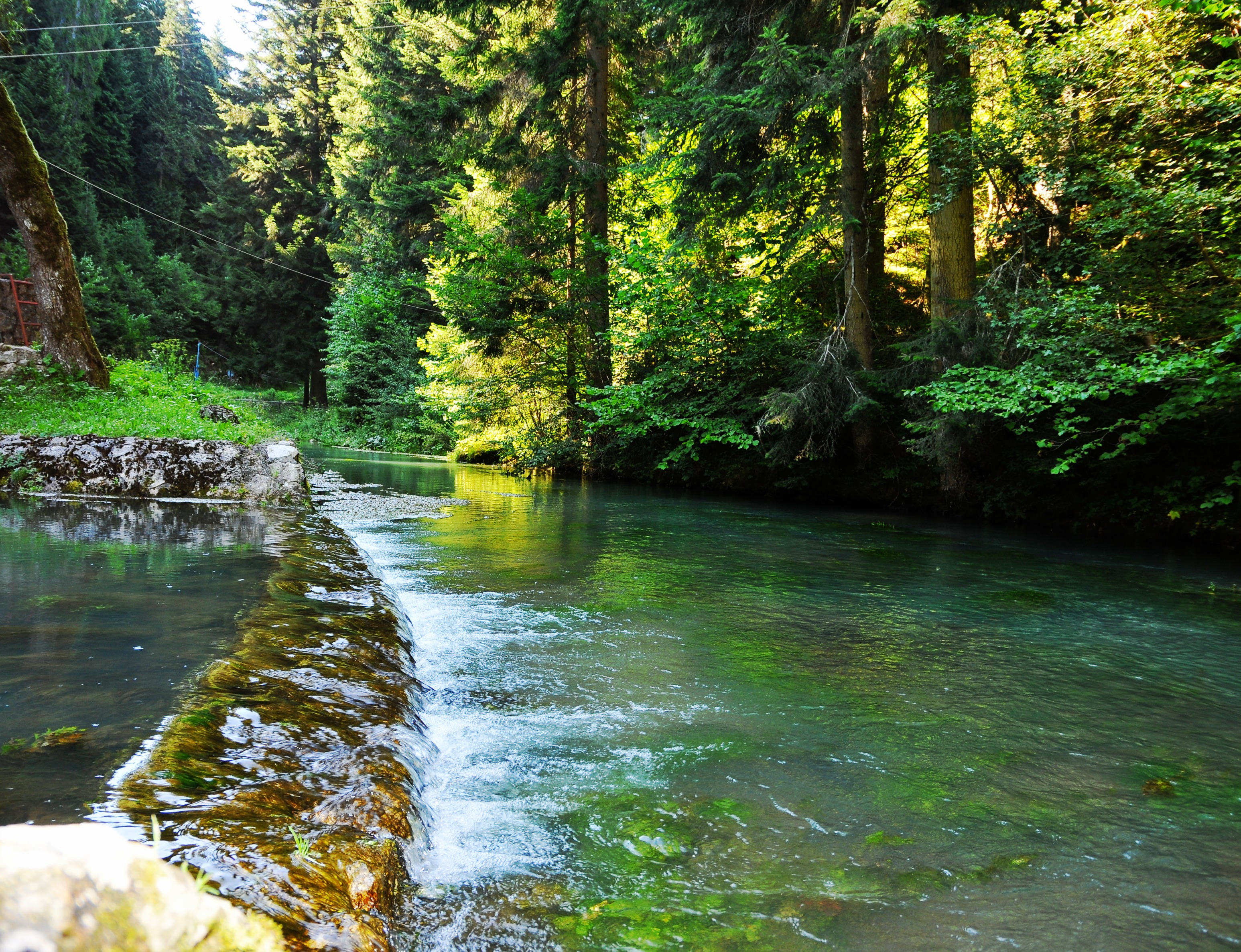 This image was uploaded as part of Trace of Soul 2016.